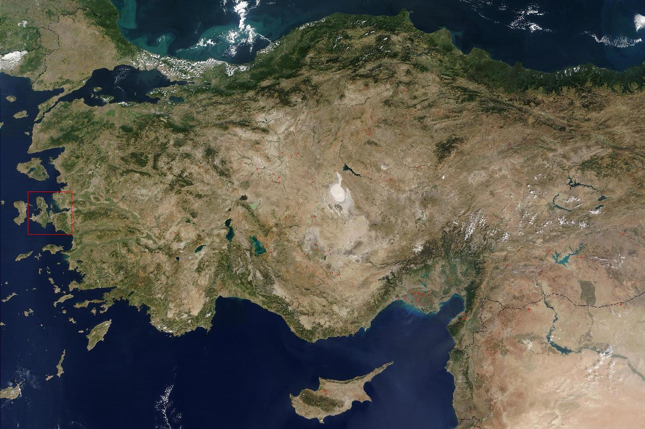 Turkey